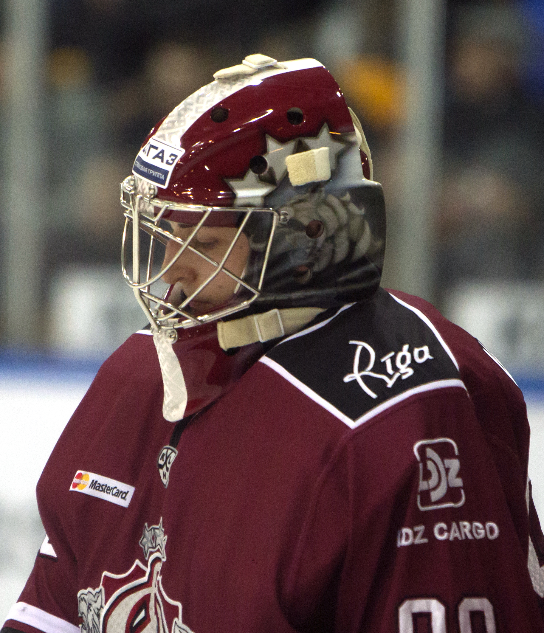 Dinamo Riga vs. Amur Khabarovsk 3:2, Liepājā, KHL, 2016-11-10